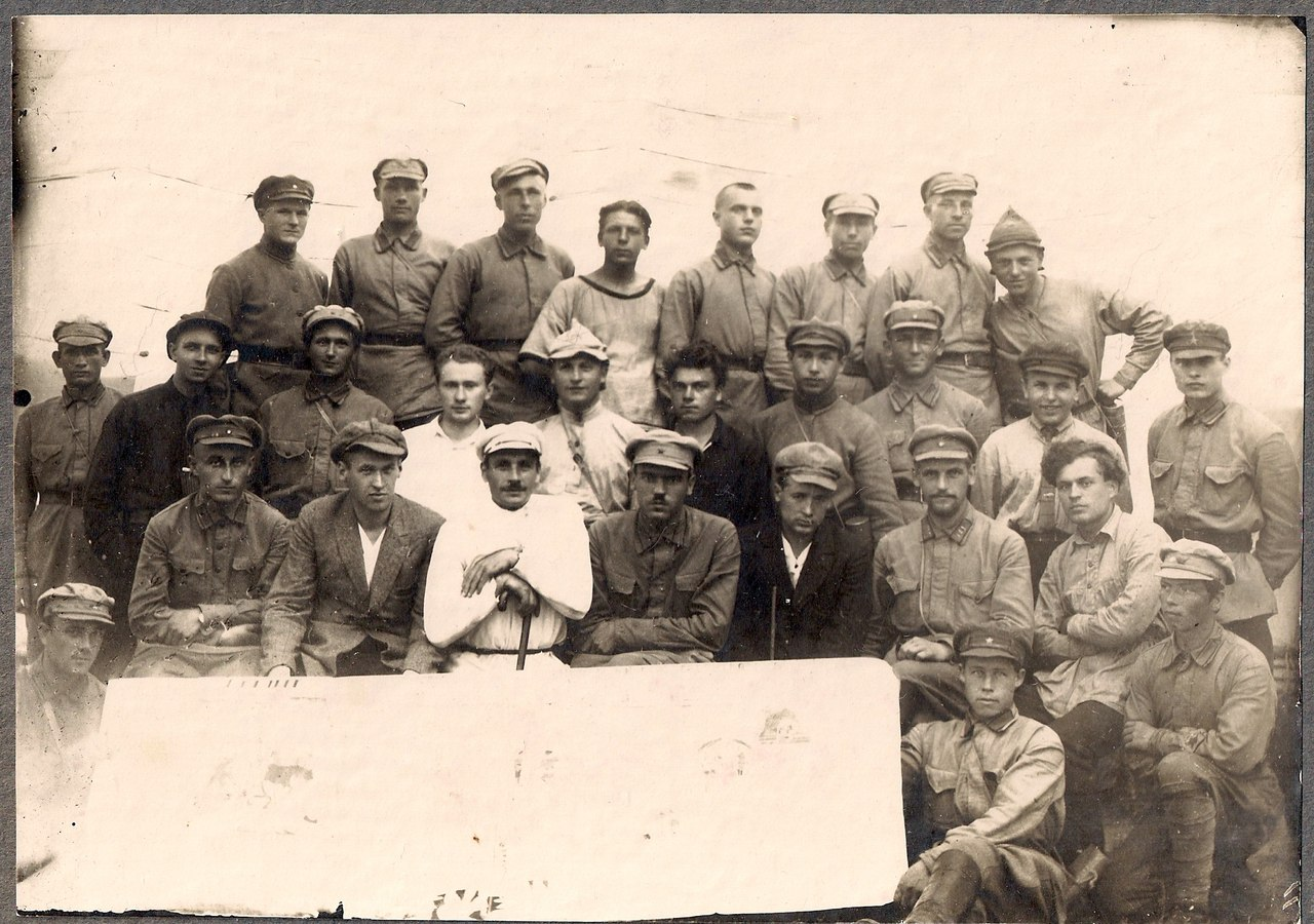 Беларуская (тарашкевіца): Беларускія пісьменьнікі ў вайсковым лягеры. Зьлева направа: У 1-шым радзе: другі - У. Дубоўка, трэці - А. Гурло, пяты - К. Чорны, сёмы - А. Бабарэка. У другім радзе: другі - Алесь Дудар, чацьвёрты - А. Вольны, пяты - Я. Пушча, шосты - П. Трус. 1926